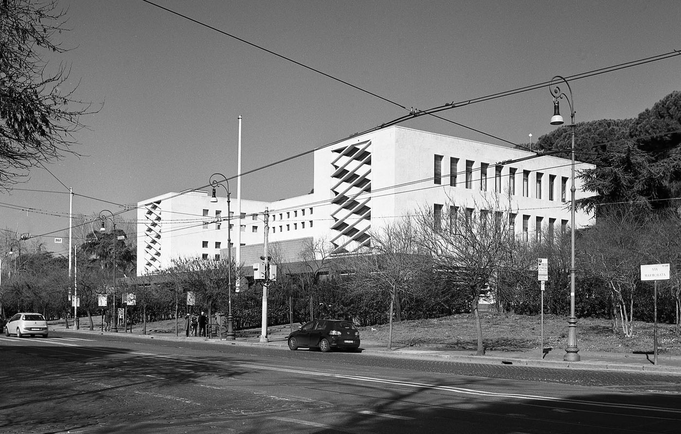 Ufficio postale Ostiense 2016